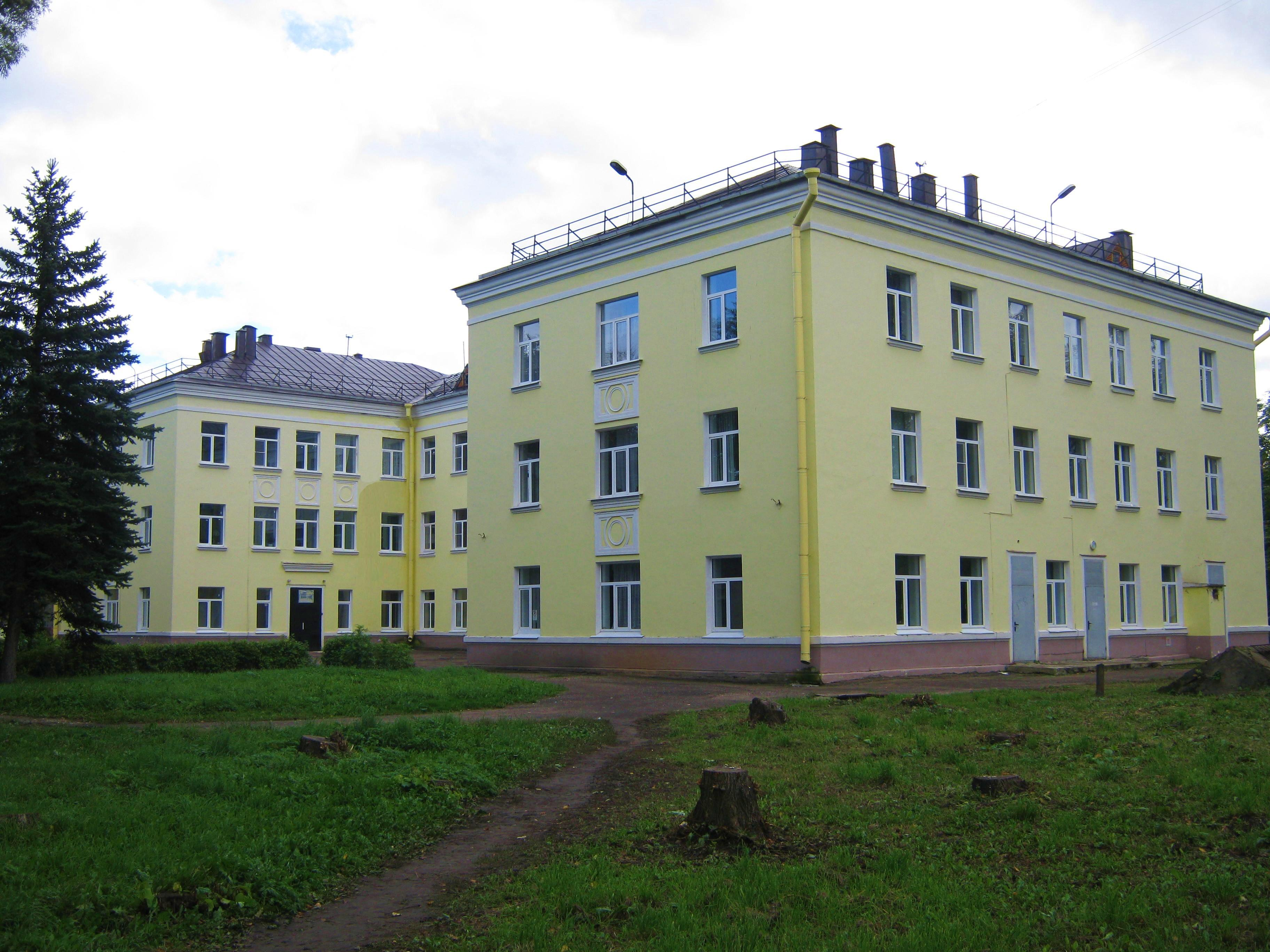 Железнодорожная больница (Ржев)